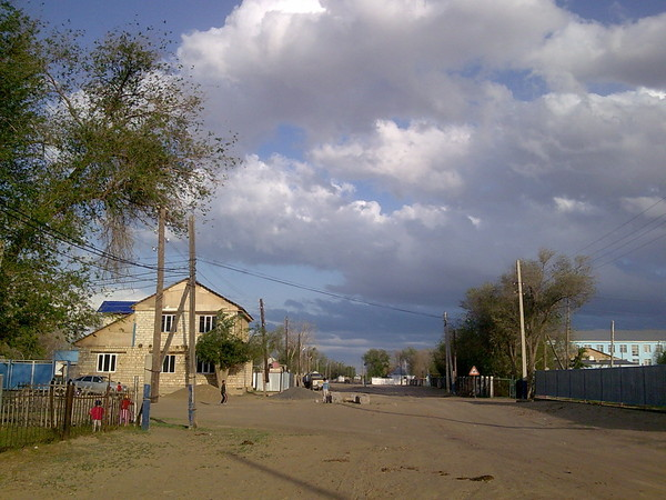 Город Шалкар (Челкар), ул. Мамедовой